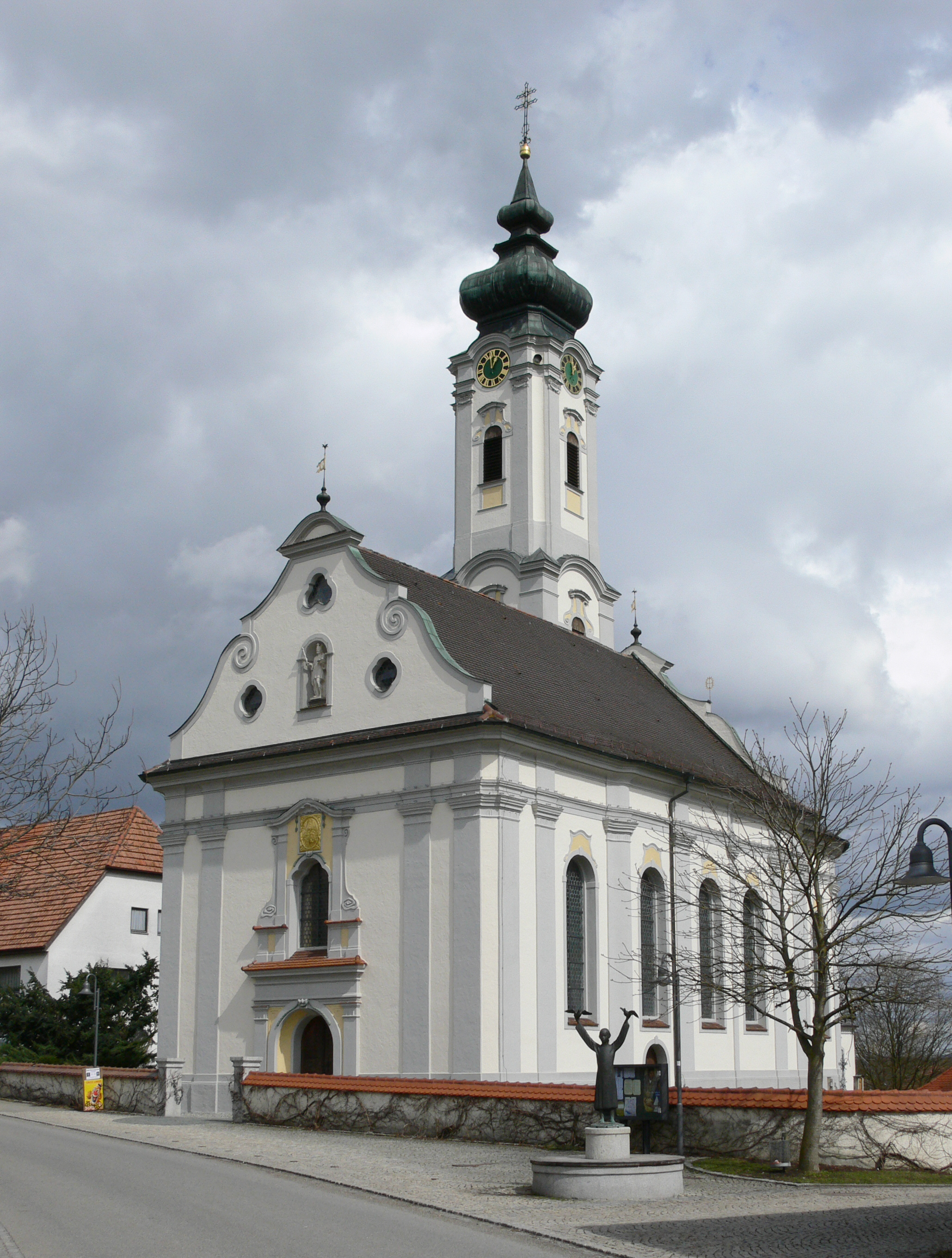 Außenansicht Pfarrkirche St. Oswald, Otterswang Bad Schussenried, Landkreis Biberach, Baden-Württemberg